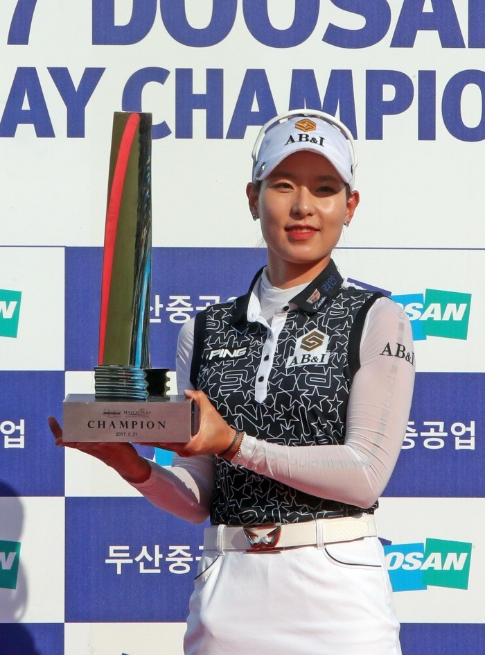 김자영 2017 두산매치플레이 우승